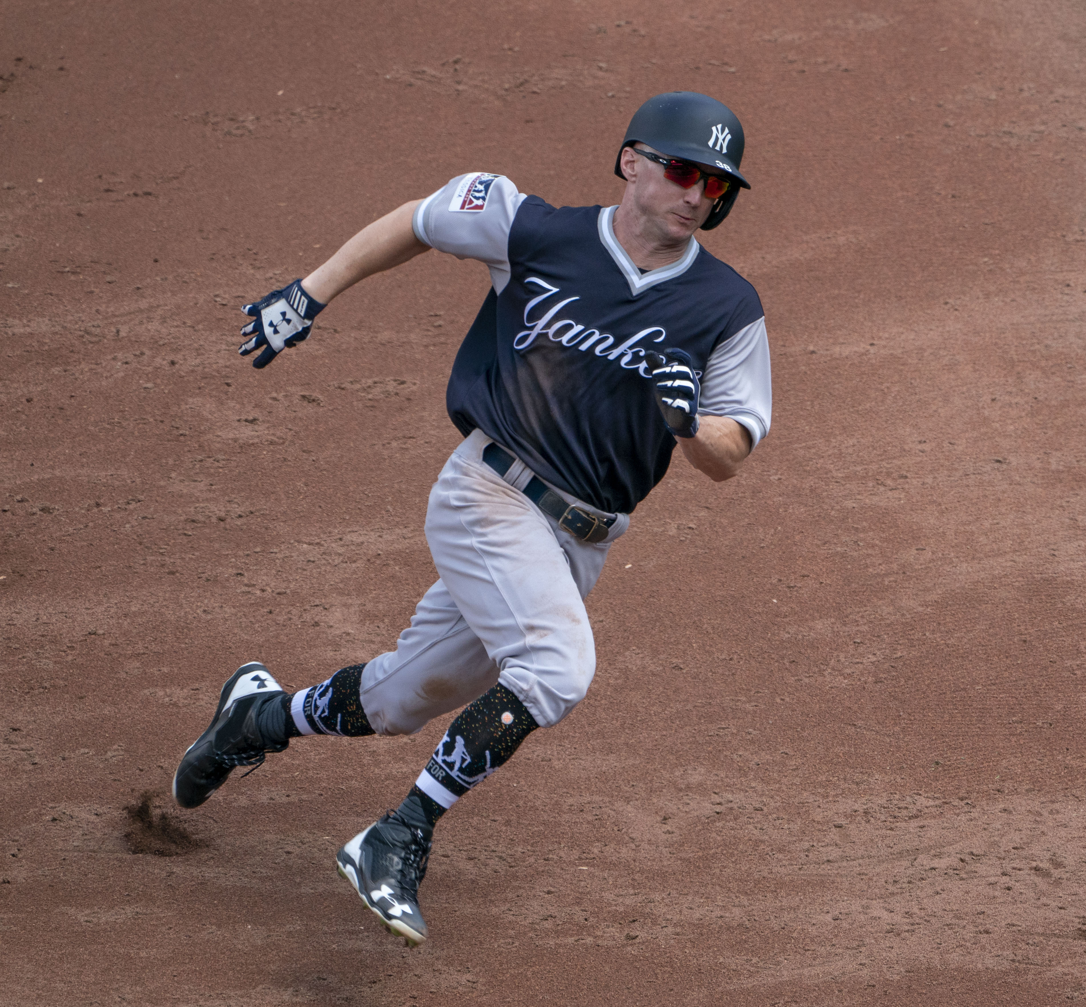 Yankees at Orioles 8/25/18